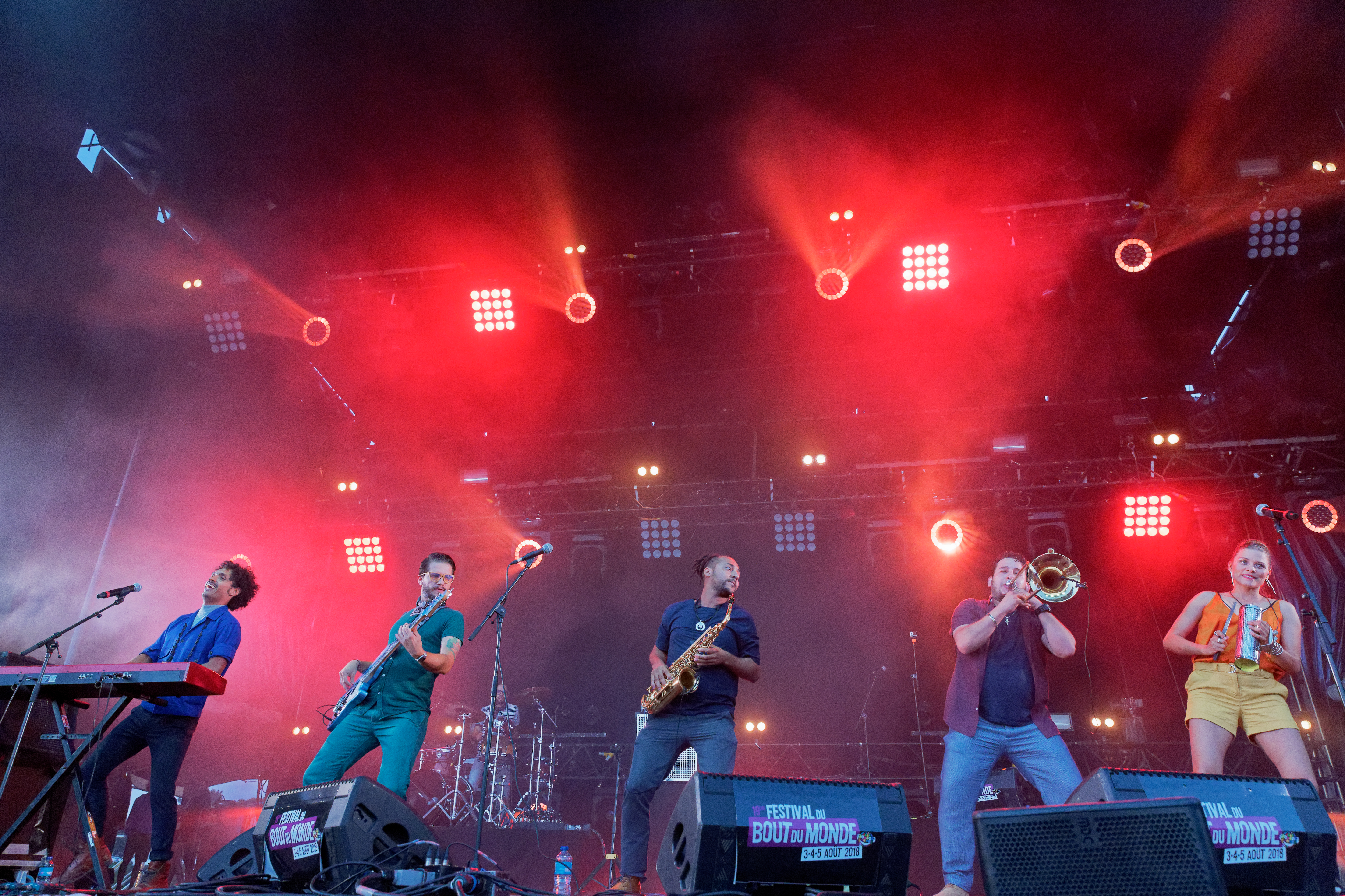 Puerto Candelaria en concert sur la scène Landaoudec lors du festival du Bout du Monde 2018 à Crozon dans le Finistère (France).